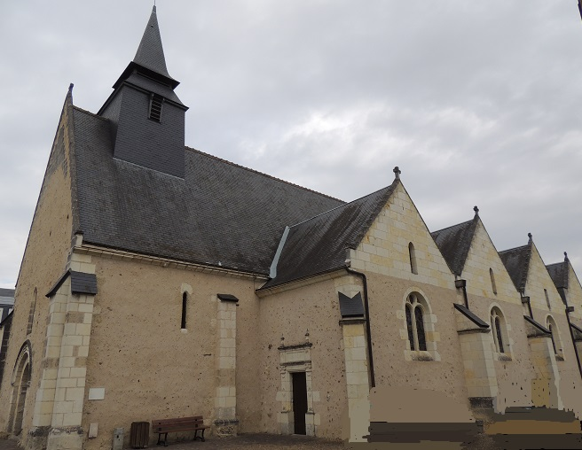 Église Saint-Pierre-et-Saint-Paul de Ruillé-sur-Loir, début occidental de la nef avec petit clocher à double toit et facade Sud avec 4 chapelles perpendiculaires à la nef